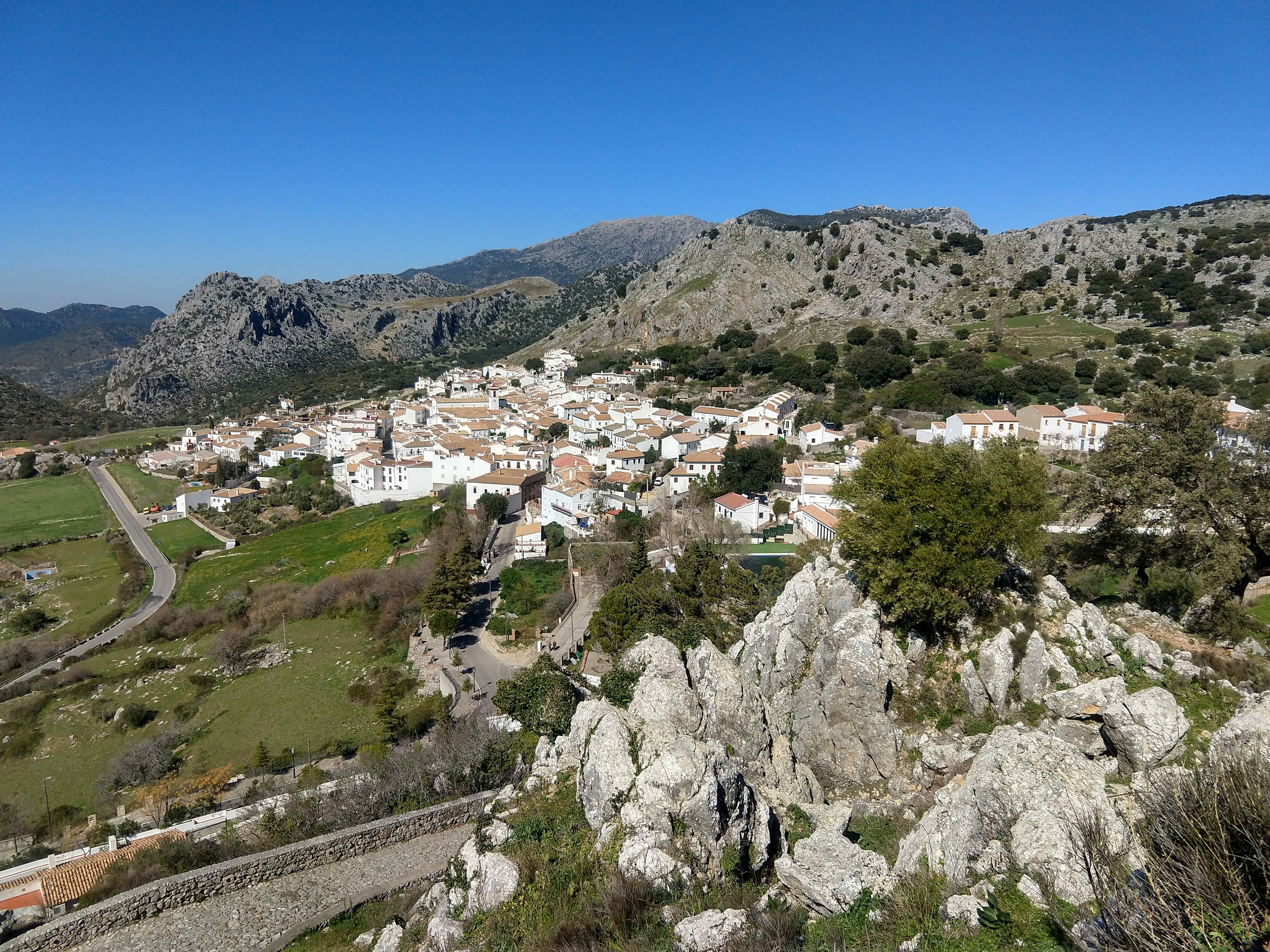 Vista general del pueblo de Benaocaz desde la Hermita del Calvario.